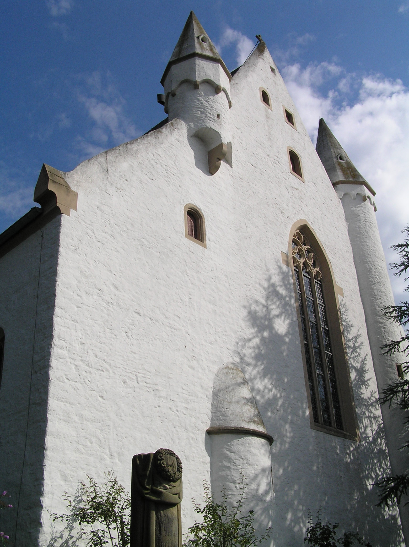 Westfront der Burgkirche Ingelheim